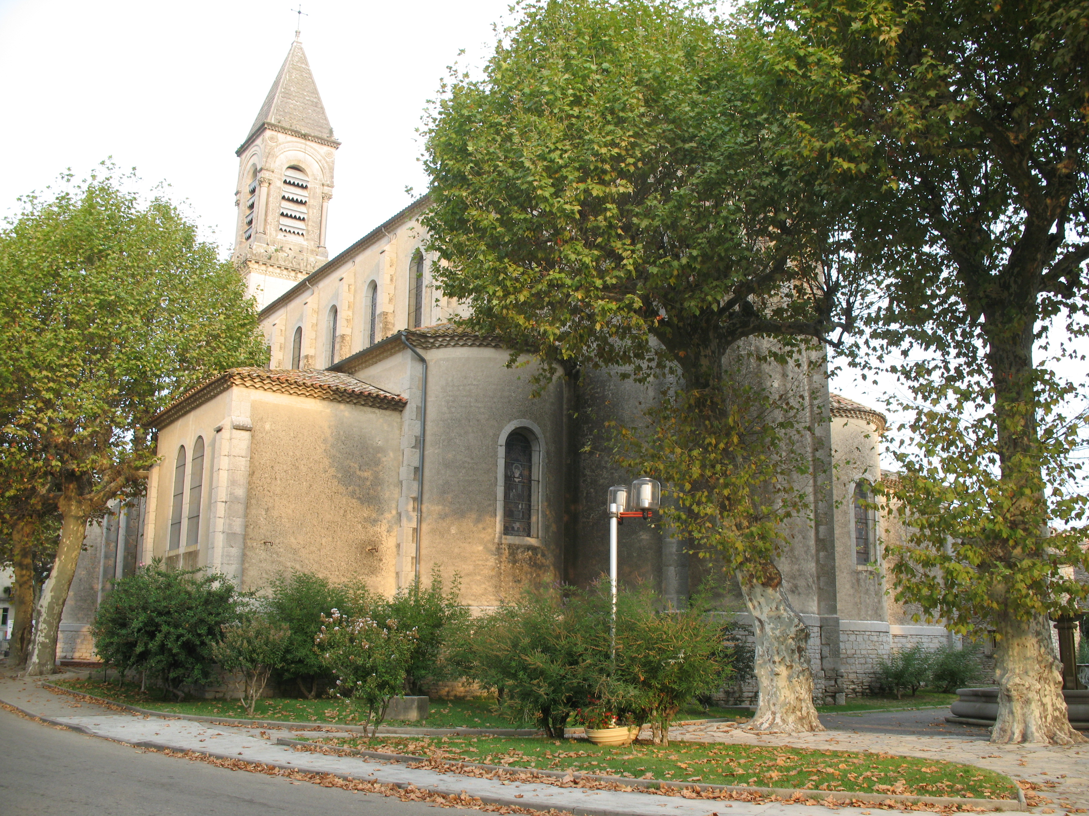 Eglise paroissiale de Pompignan